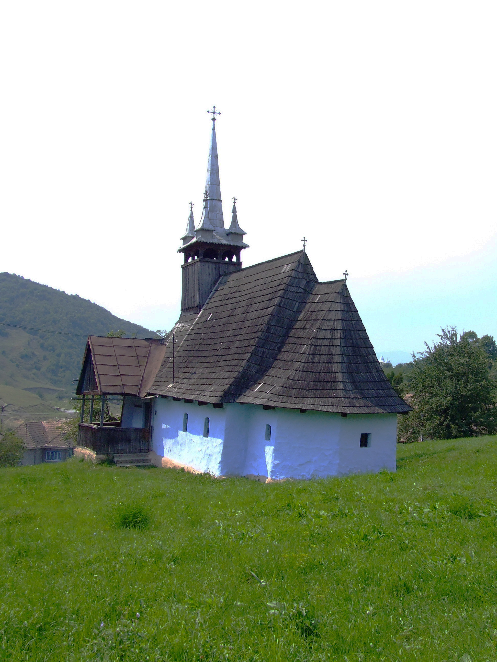 Biserica de lemn din Surduc (Biserici de lemn din Cluj)